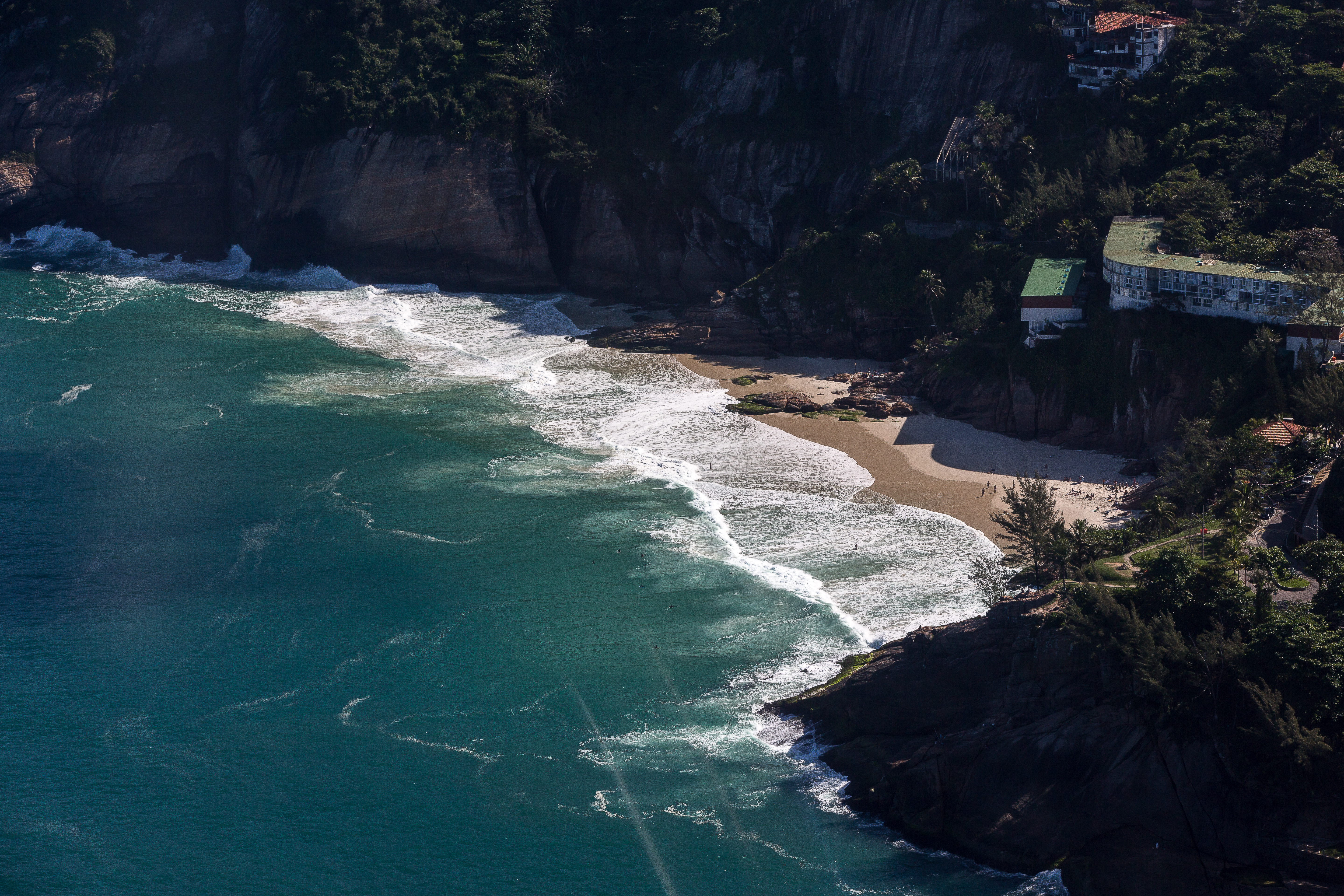 Vista aérea da Praia da Joatinga, Rio de Janeiro - RJ - Brasil.